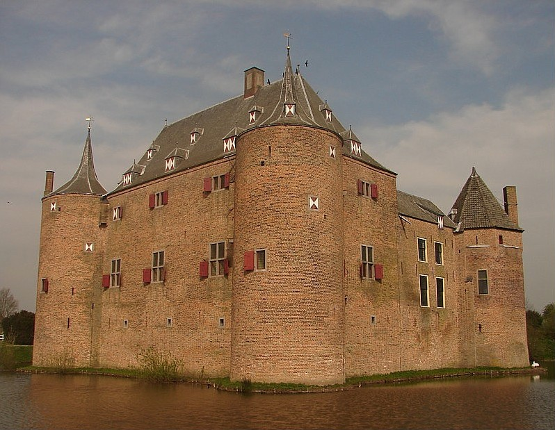 Kasteel Ammersoyen